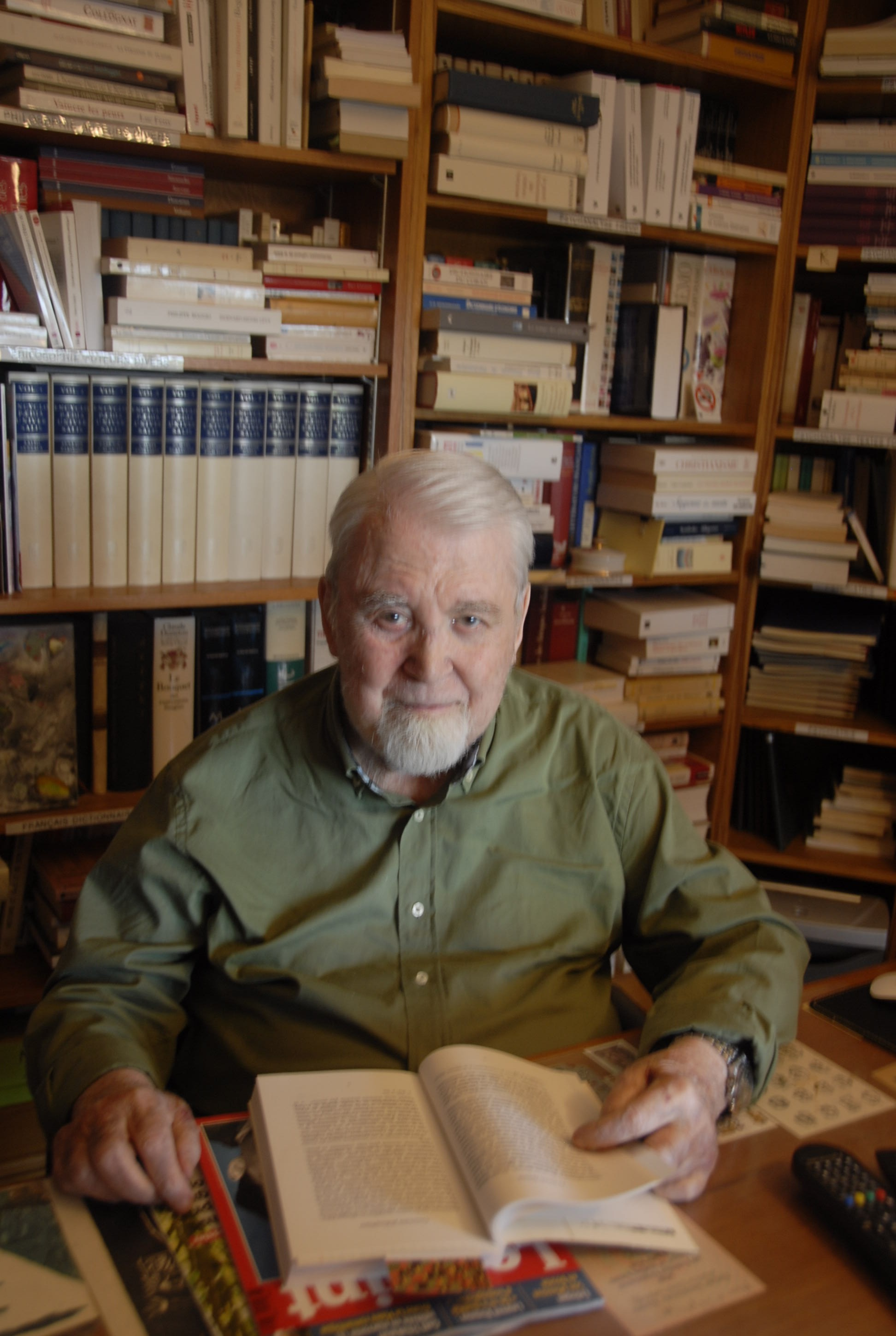 Photo de Robert Féger dans son lieu de travail